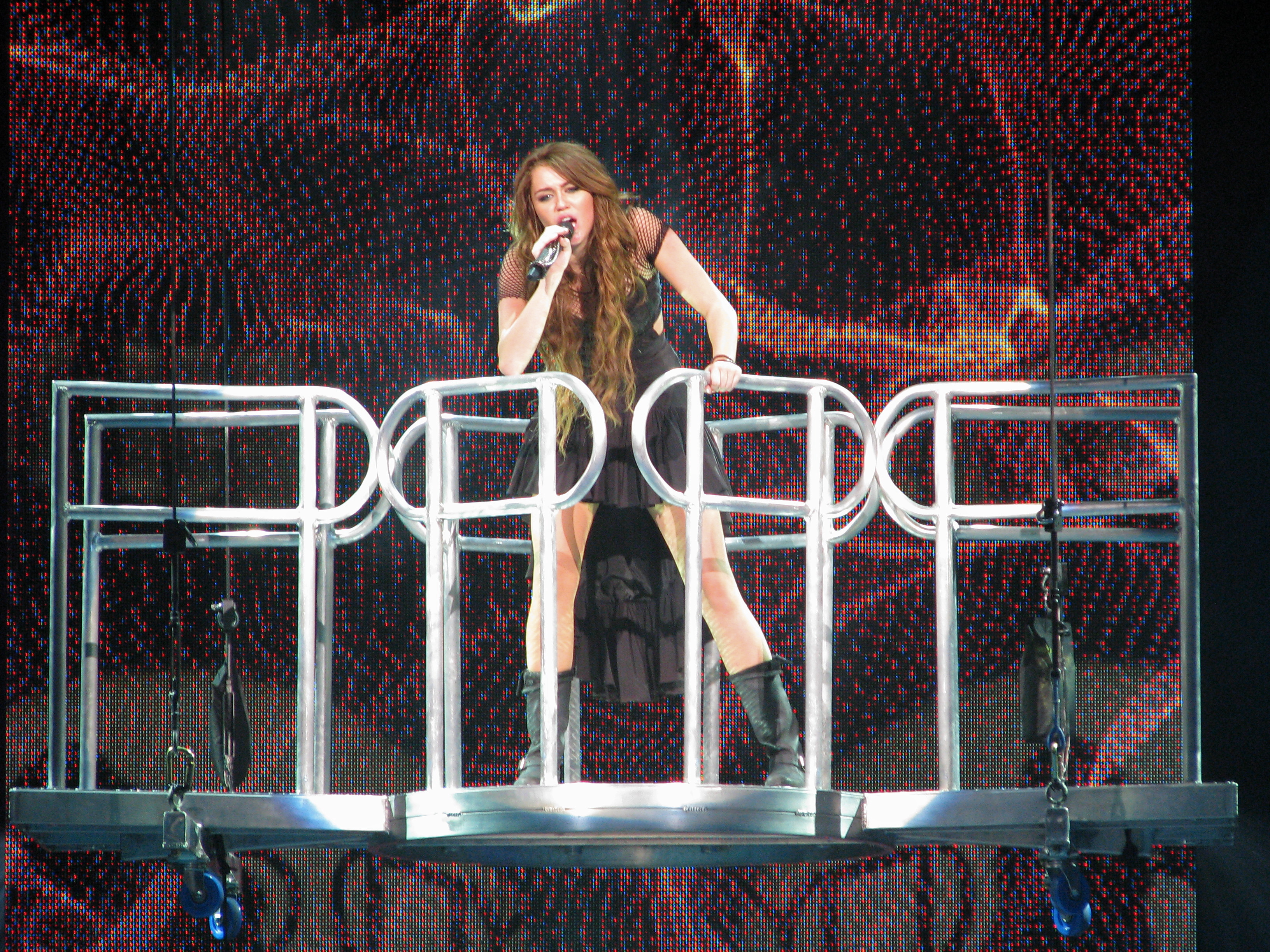 A teen singing